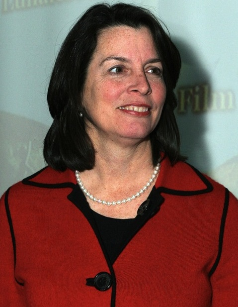 Rhode Island Lieutenant Governor Elizabeth H. Roberts.